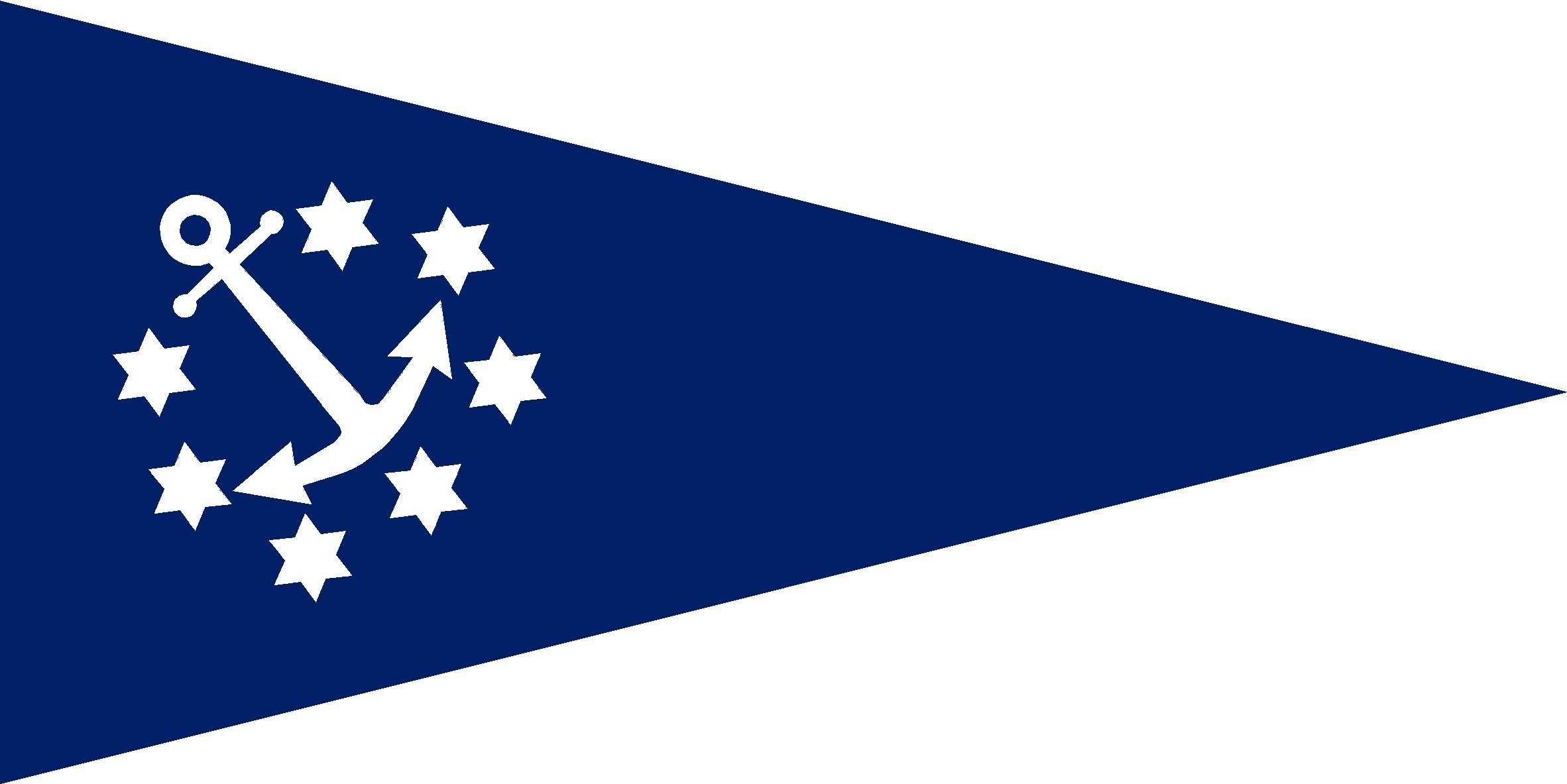 דגלון בית הספר לקציני ים